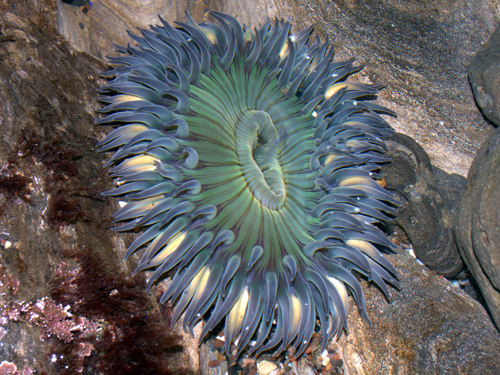 Sea Anemone